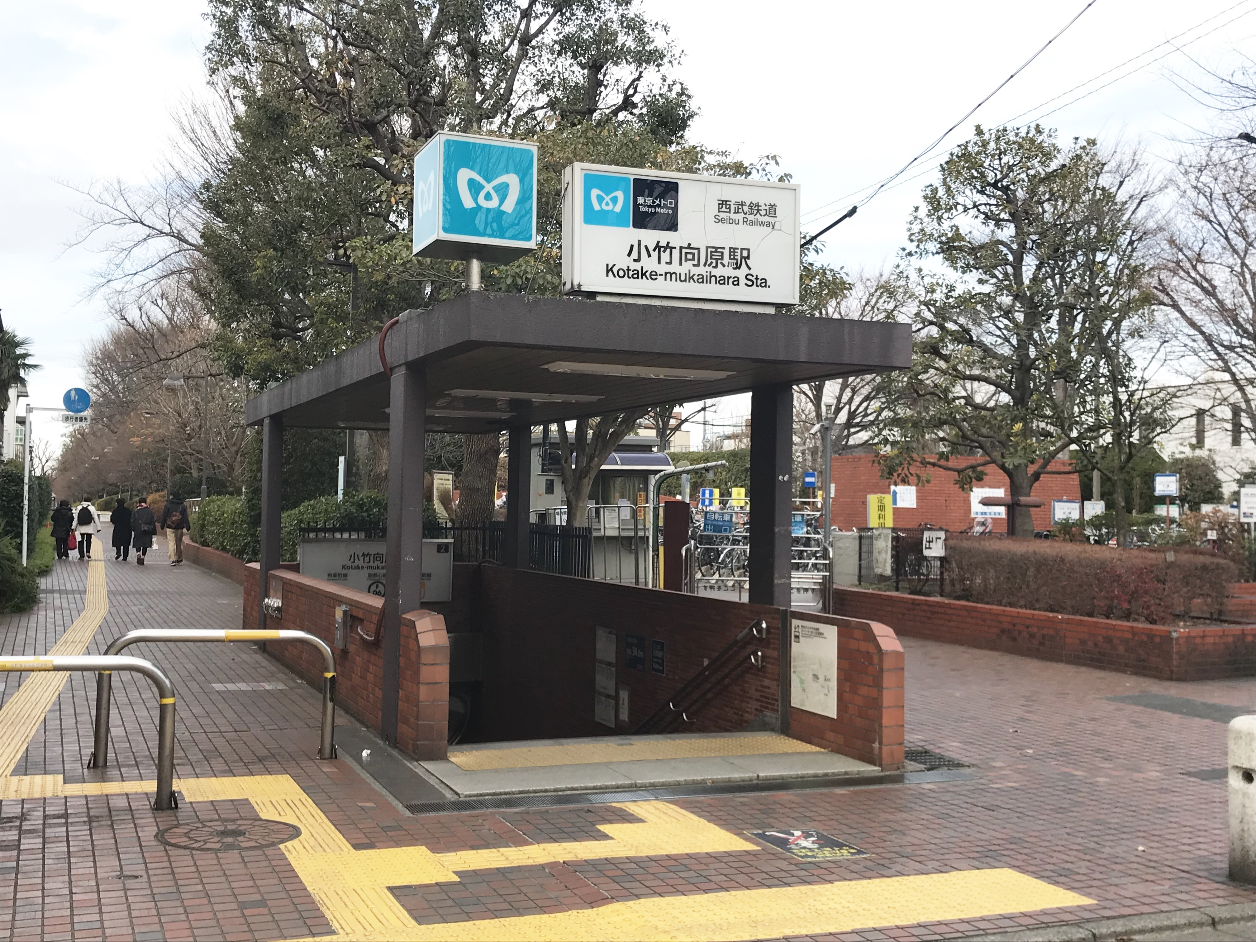 東京メトロ有楽町線・副都心線・西武有楽町線小竹向原駅2番出入口